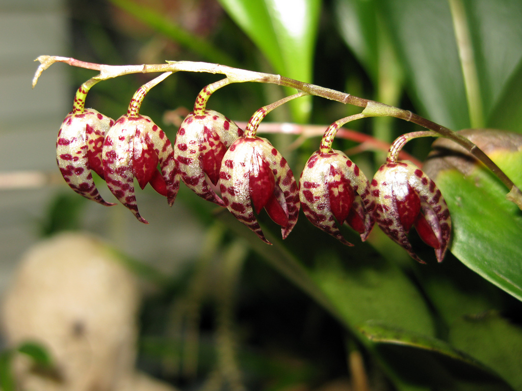 Stelis restrepioides, syn. Pleurothallis restrepioides 'Dragonstone' _inflor